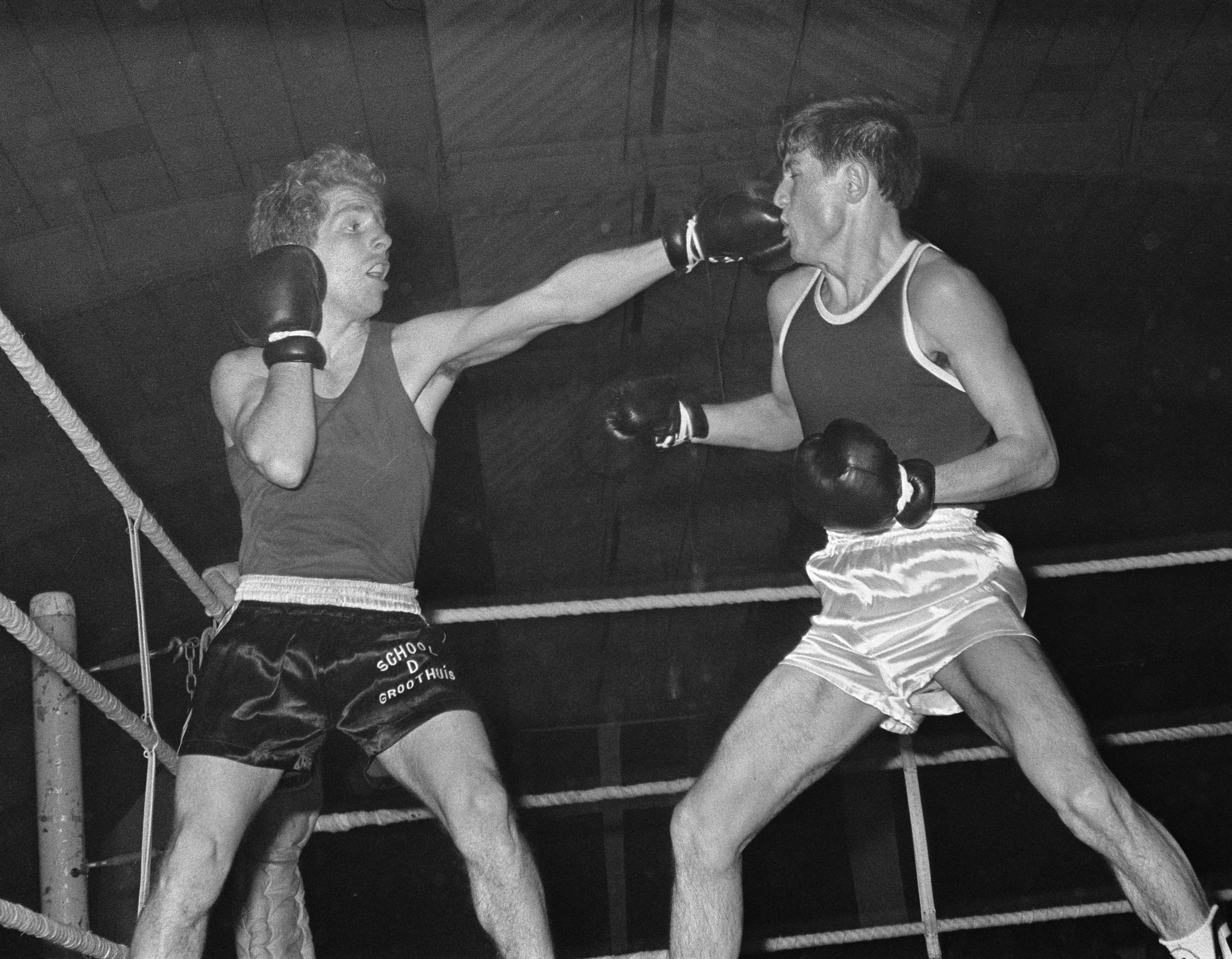 Internationaal Bokstoernooi in RAI. Huppen (links) (Ned.) en de Russische bokser Sokolov in aktie